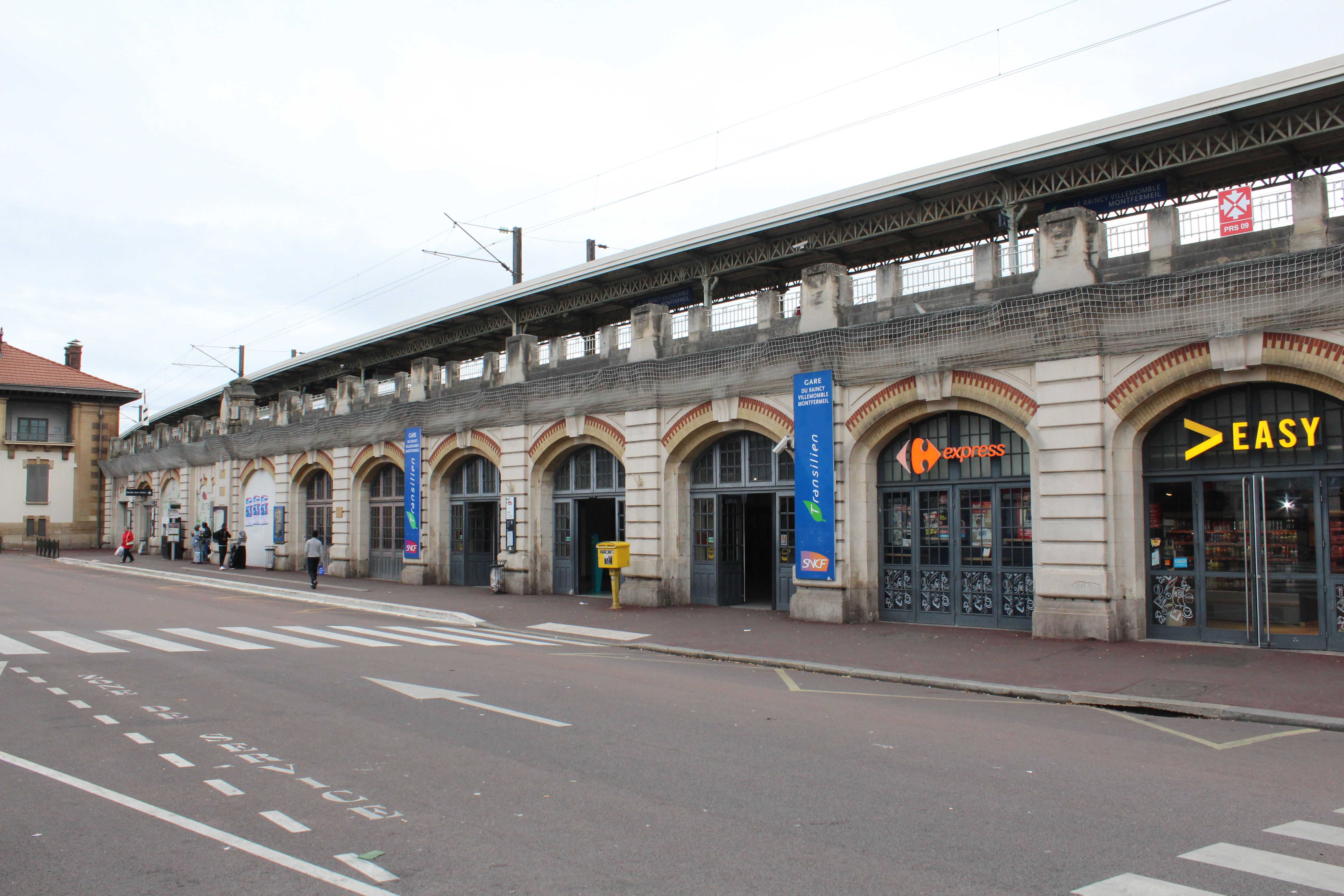 Gare du Raincy - Villemomble - Montfermeil, Le Raincy.